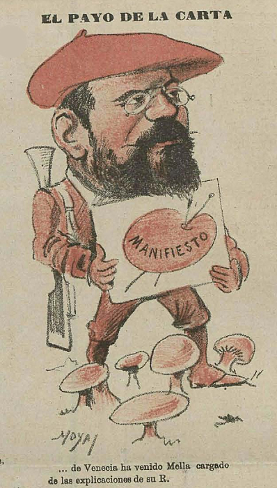 El pavo de la carta, en la revista satírica española Gedeón.